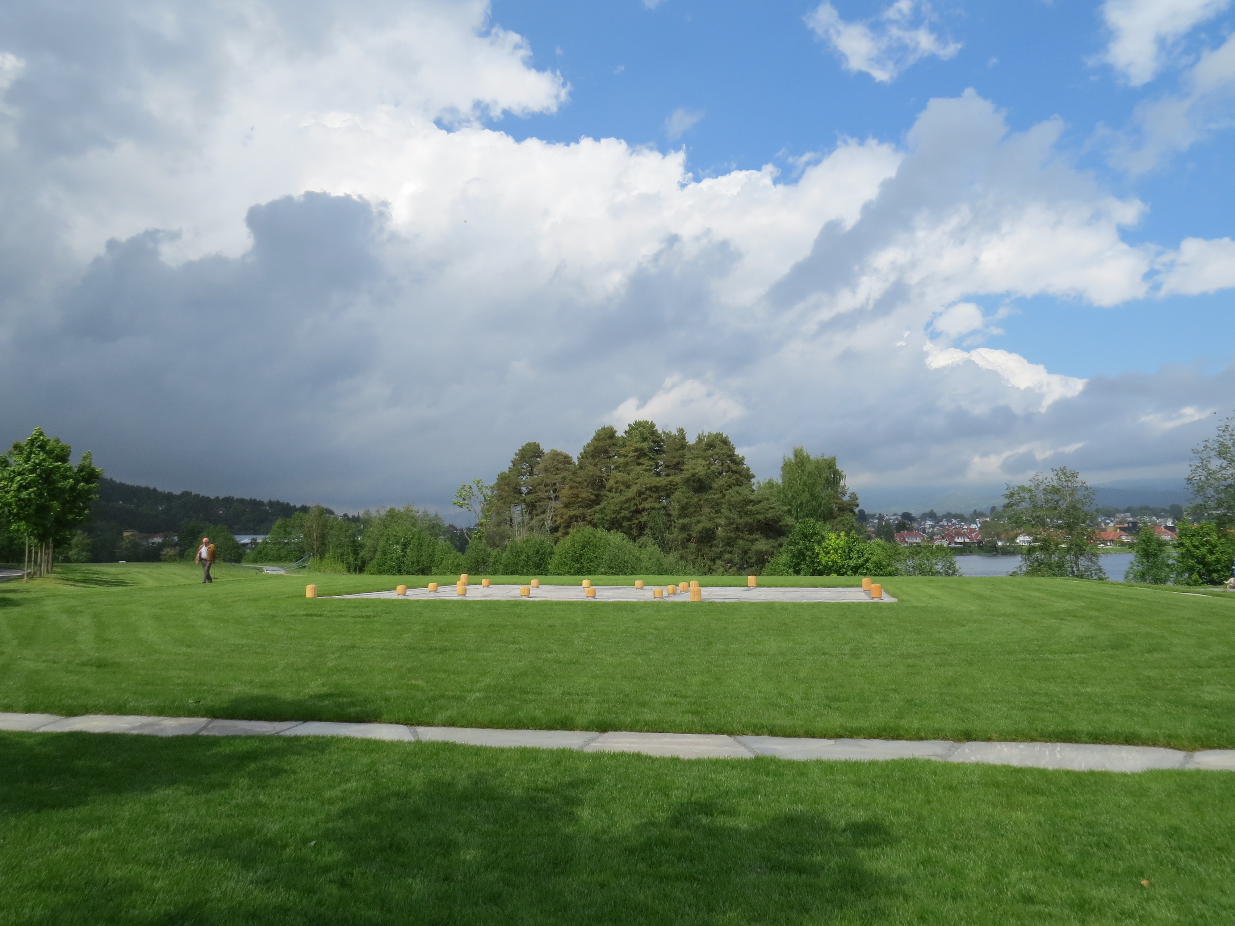 Kirker fra middelalderen ved Faret i Skien markeret med søjler